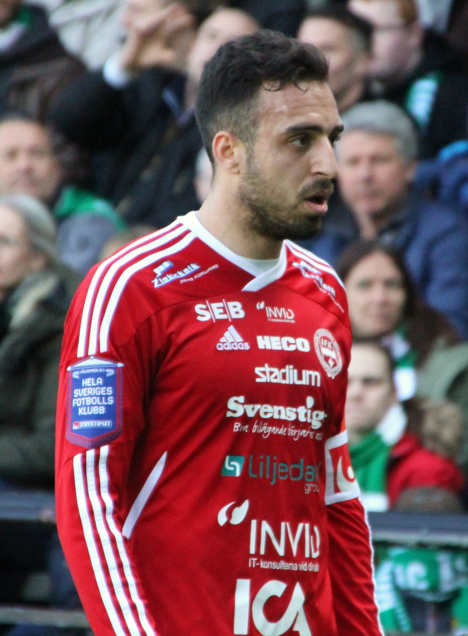 IFK Värnamos Abdul Khalili.